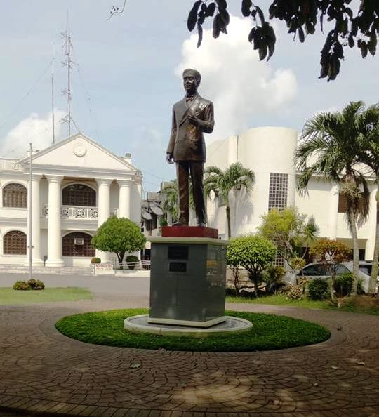 Bikol Central: Monumento ni Wenceslao Vinzons